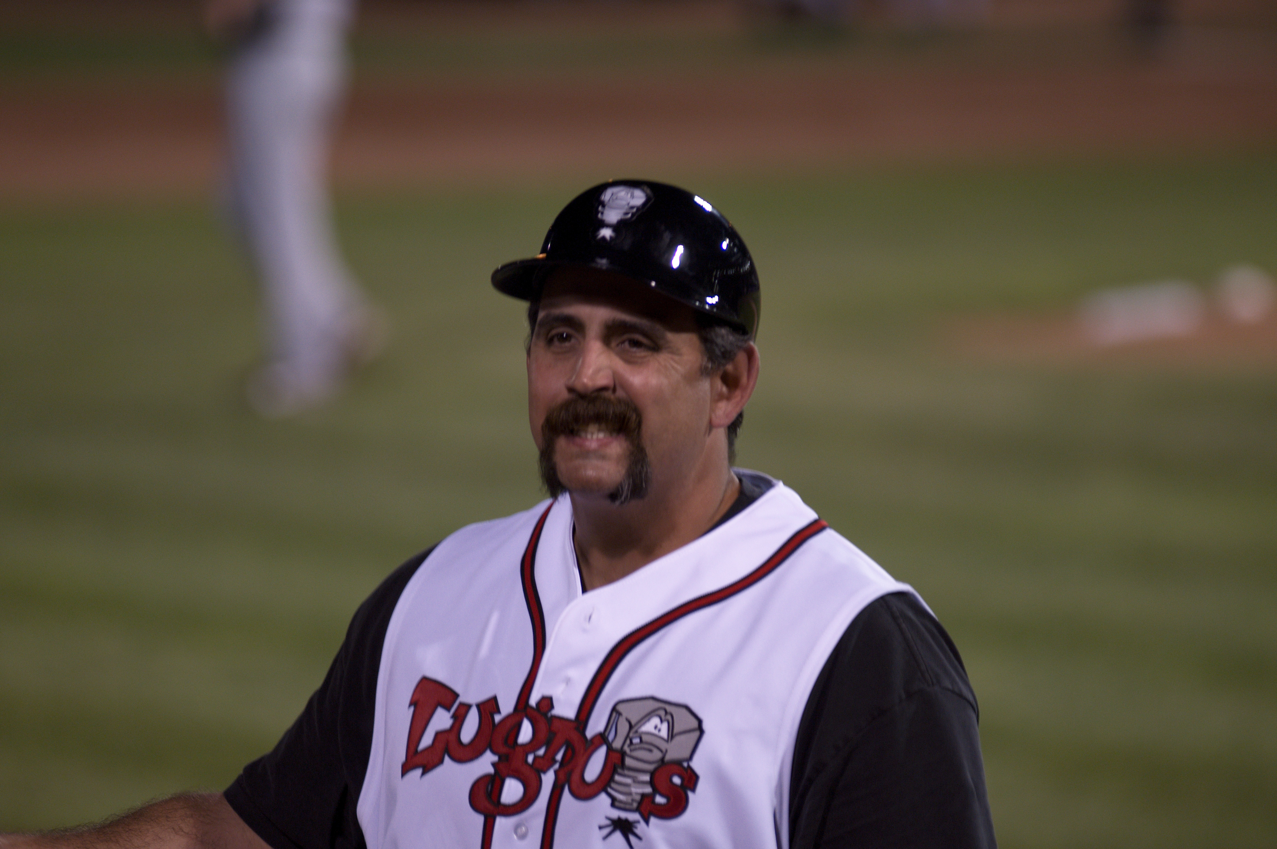 Sal Fasano